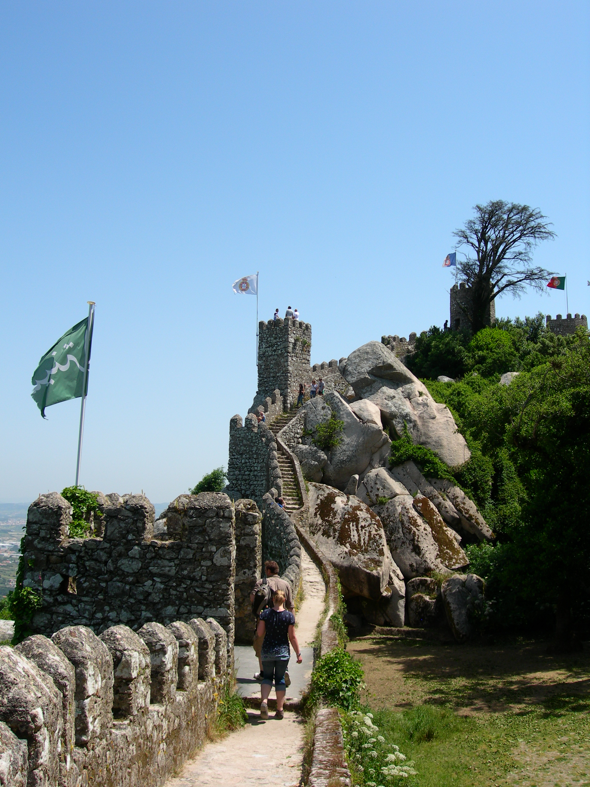 CASTELO DOS MOUROS V This file was uploaded for Wiki Loves Monuments in Portugal with the unique identifier 336929.